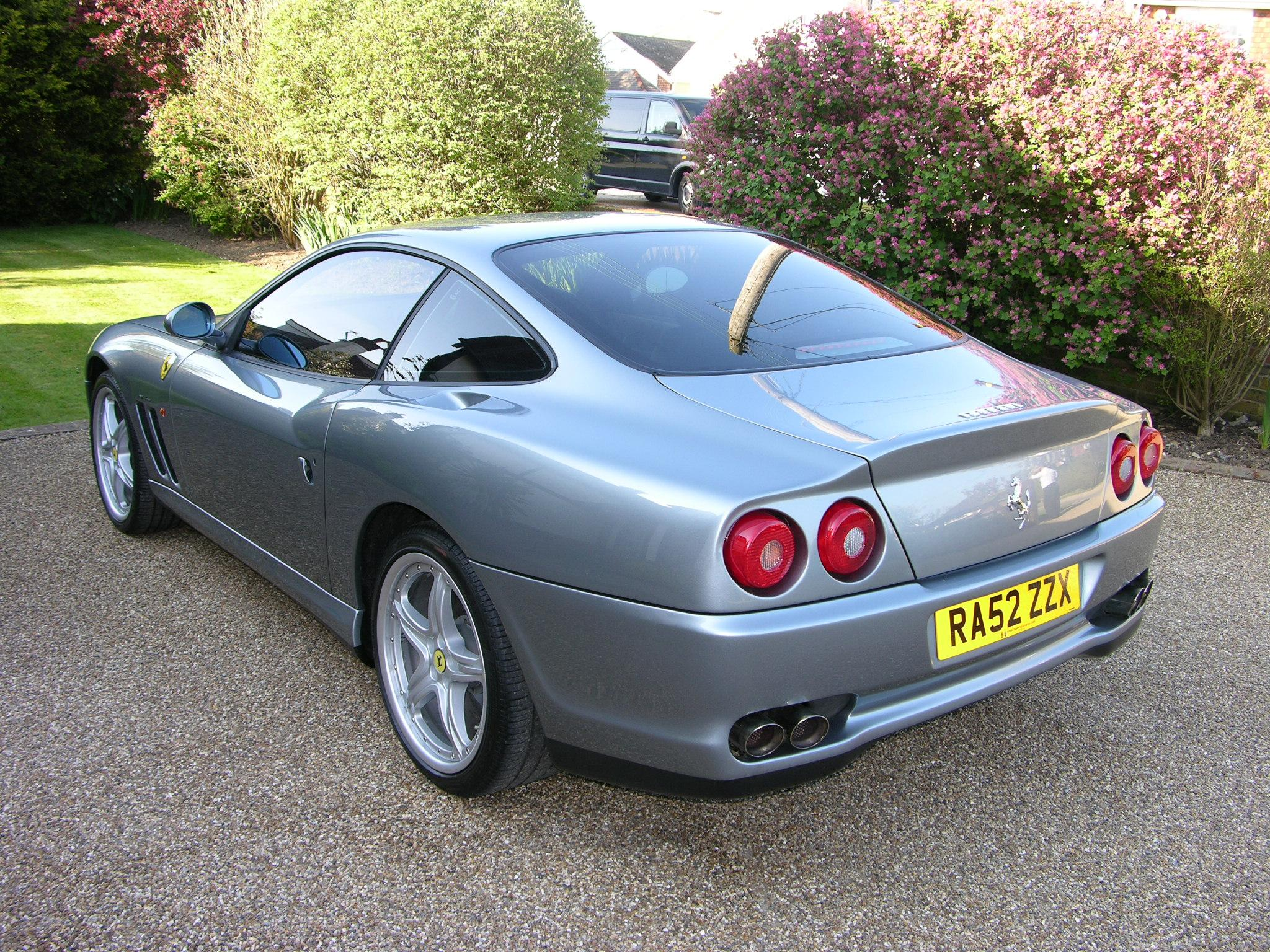 Ferrari 575 Maranello F1